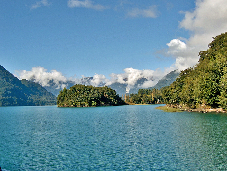 Auf dem Lago todos de Santos im Nationalpark Vicente Pérez Rosales, Chile